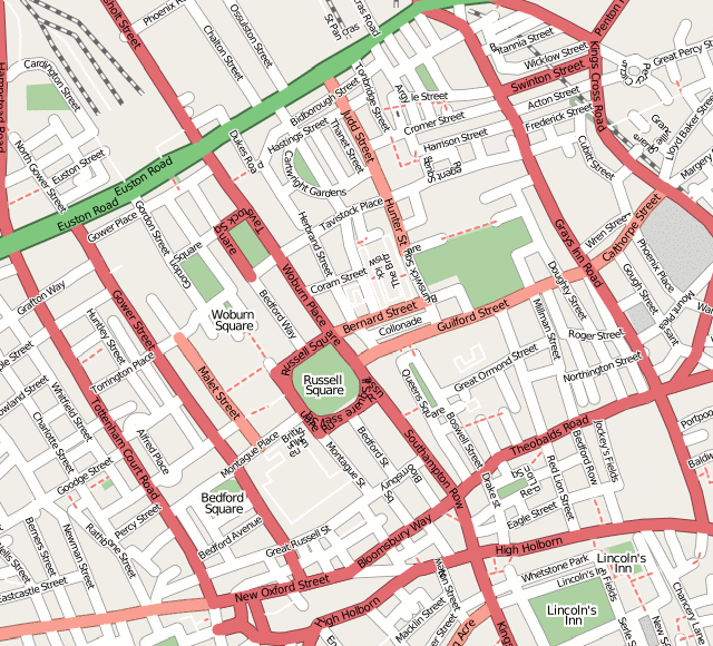 Map of Bloomsbury